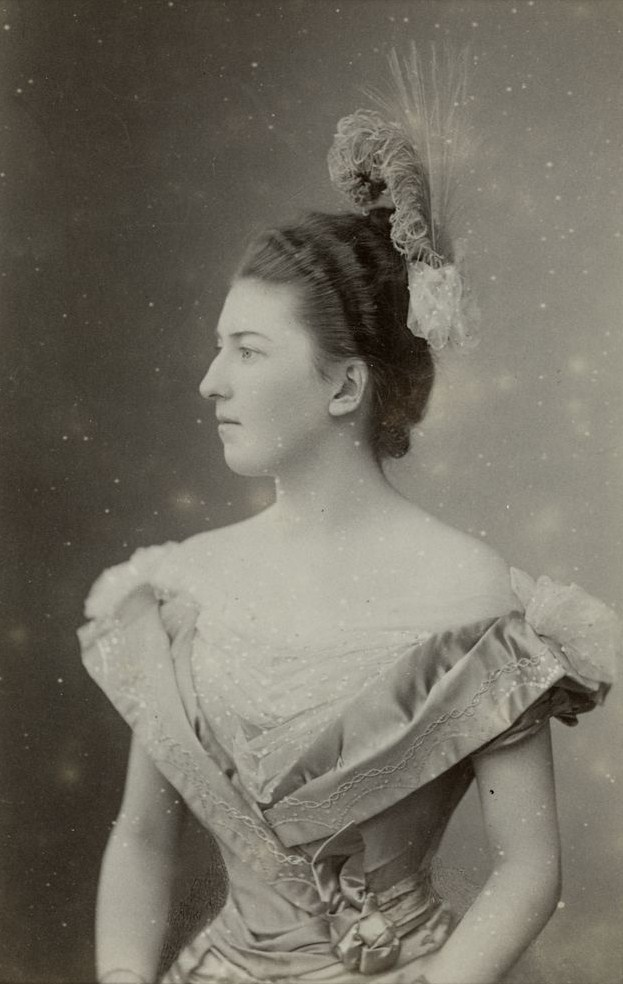 Grote, Natalie von, geb. von Richter (1877—1919)